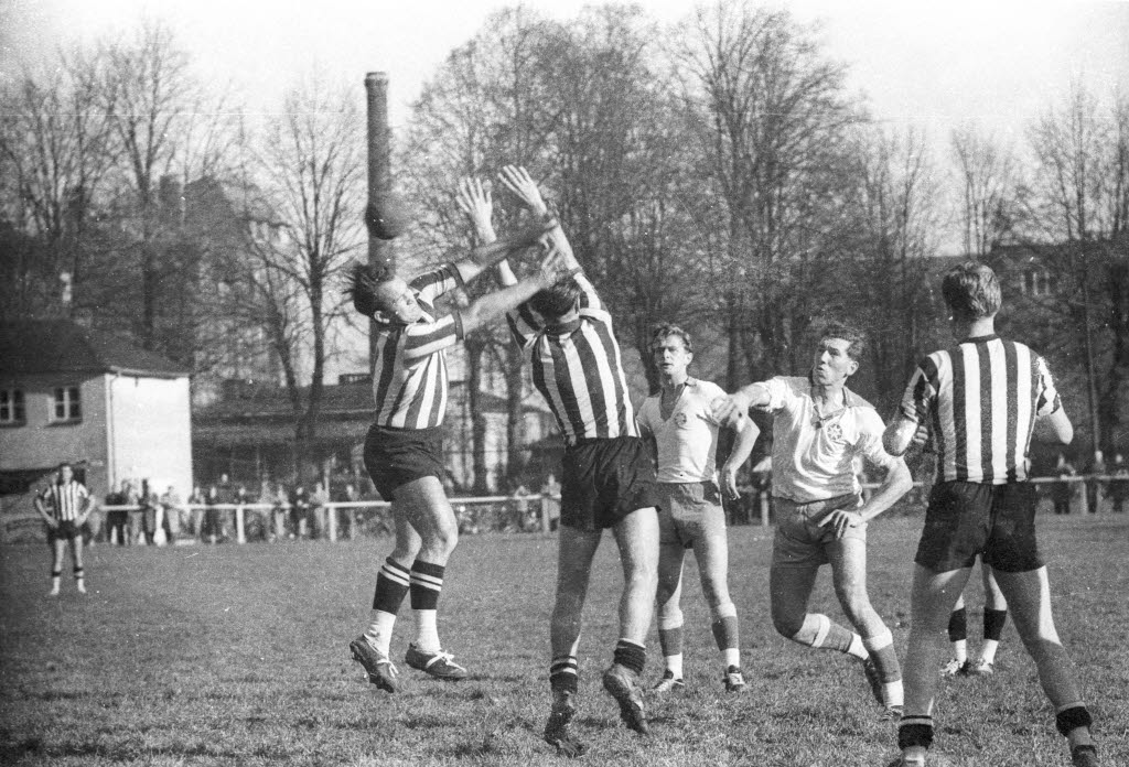 im Stadion Waldwiese an der Hamburger Chaussee.